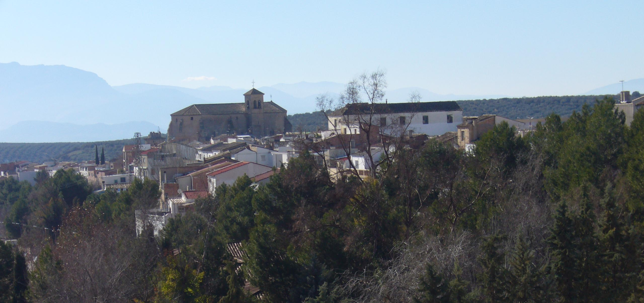 Vista general de Torreperogil.